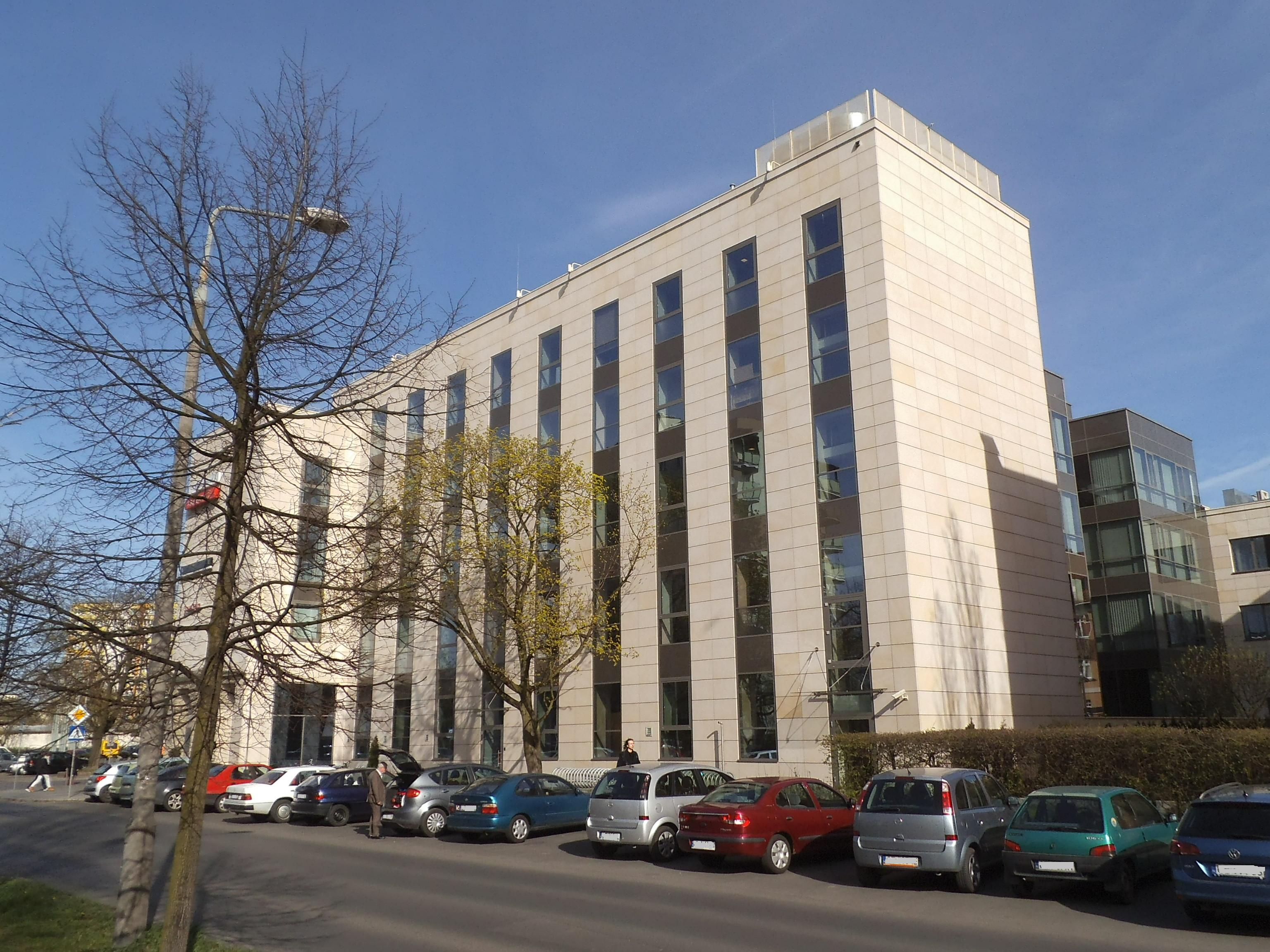 Orbita Business Park Toruń